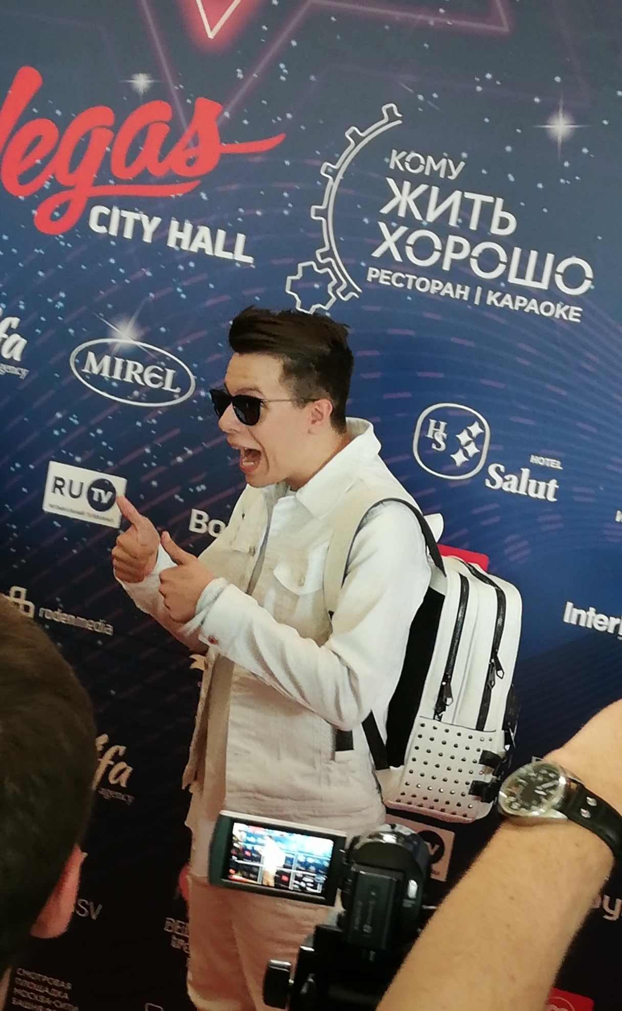 Roko, rappresentante della Croazia all'Eurofestival 2019, al Pre-Party di Mosca